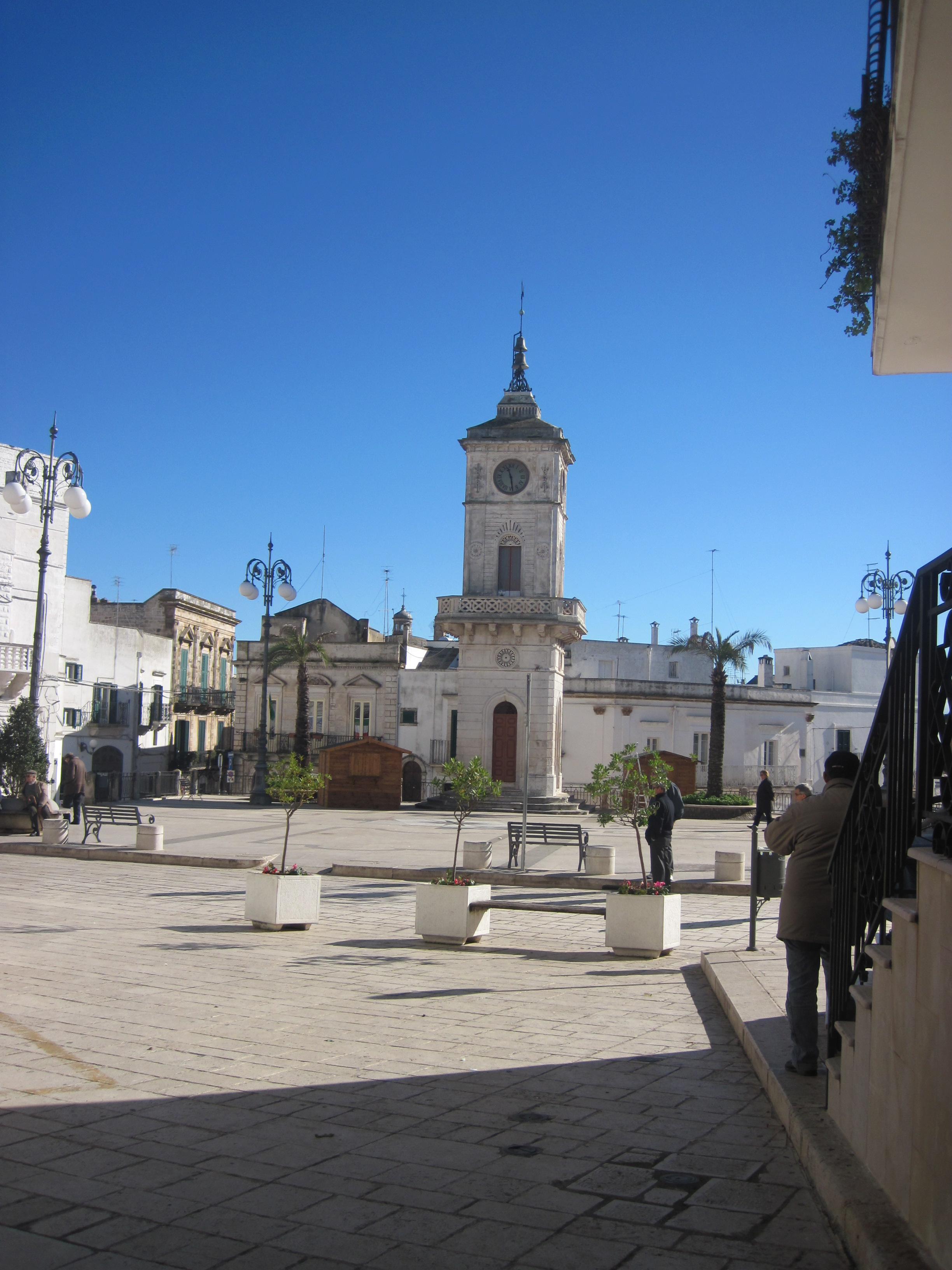 la piazza principale di Ceglie Messapica e l'ottocentesca torre dell'orologio.